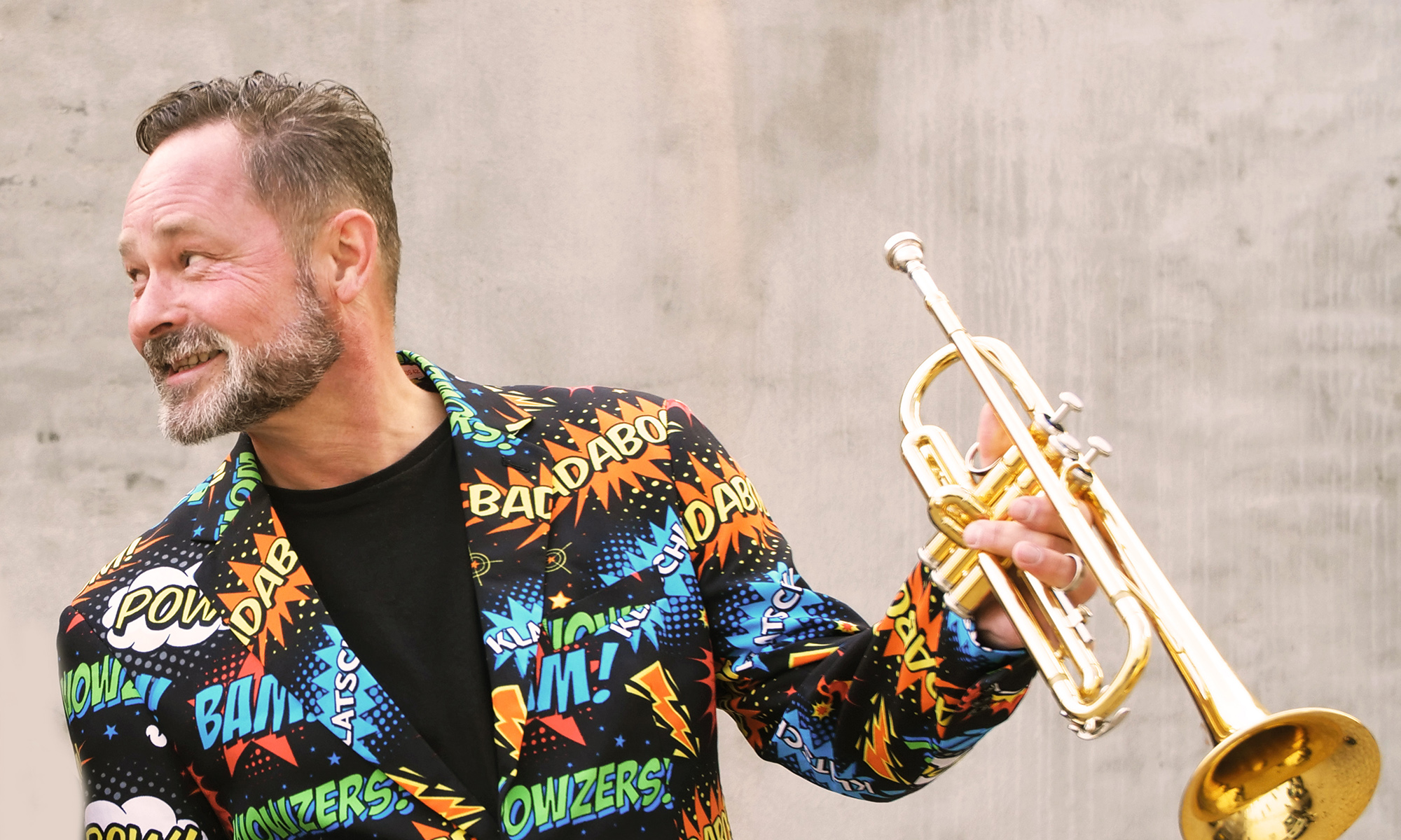 Foto: Anton Falk (Made in Aarhus films)